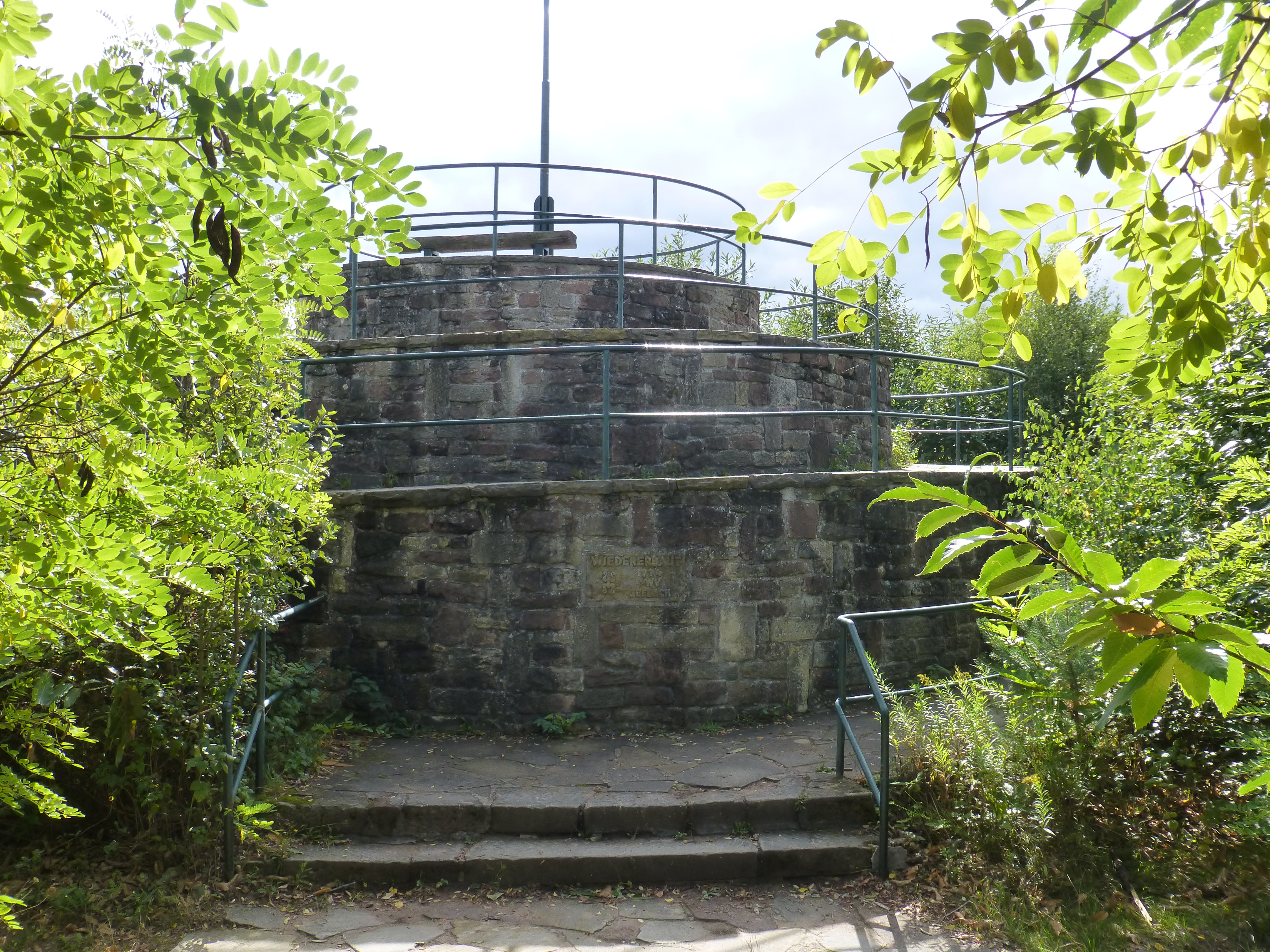 Der Zeppelinturm in Bad Dürkheim